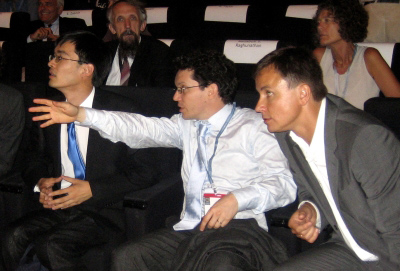 Terence C. Tao, Wendelin Werner and Andrei Jurjewitsch Okunkow at the ICM 2006 in Madrid